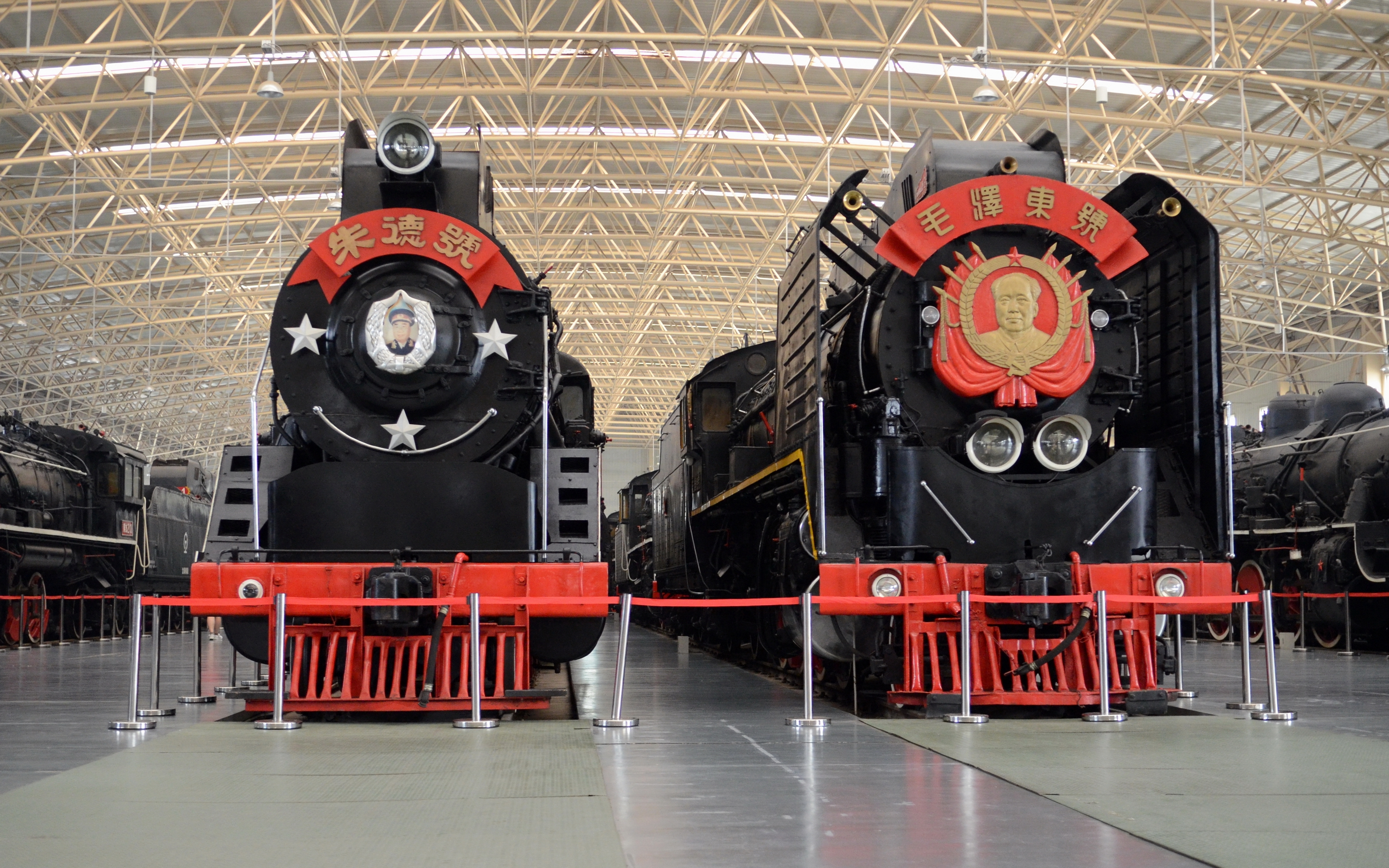 保存在中国铁道博物馆的JF 1191“朱德号”与JF 304号“毛泽东号”蒸汽机车